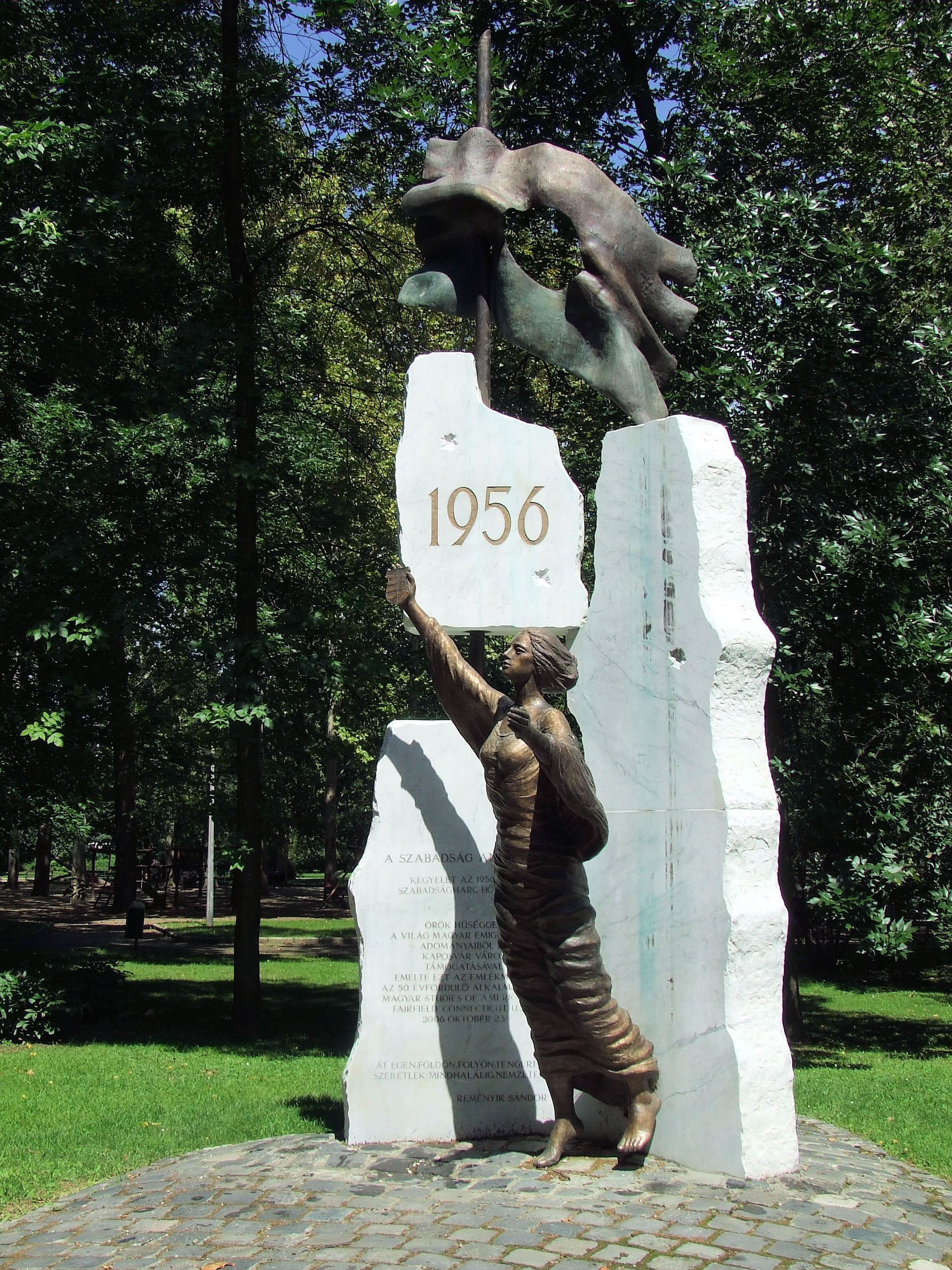 Gera Katalin Szabadság Angyala című 1956-os emlékműve a kaposvári Berzsenyi parkban (2006)